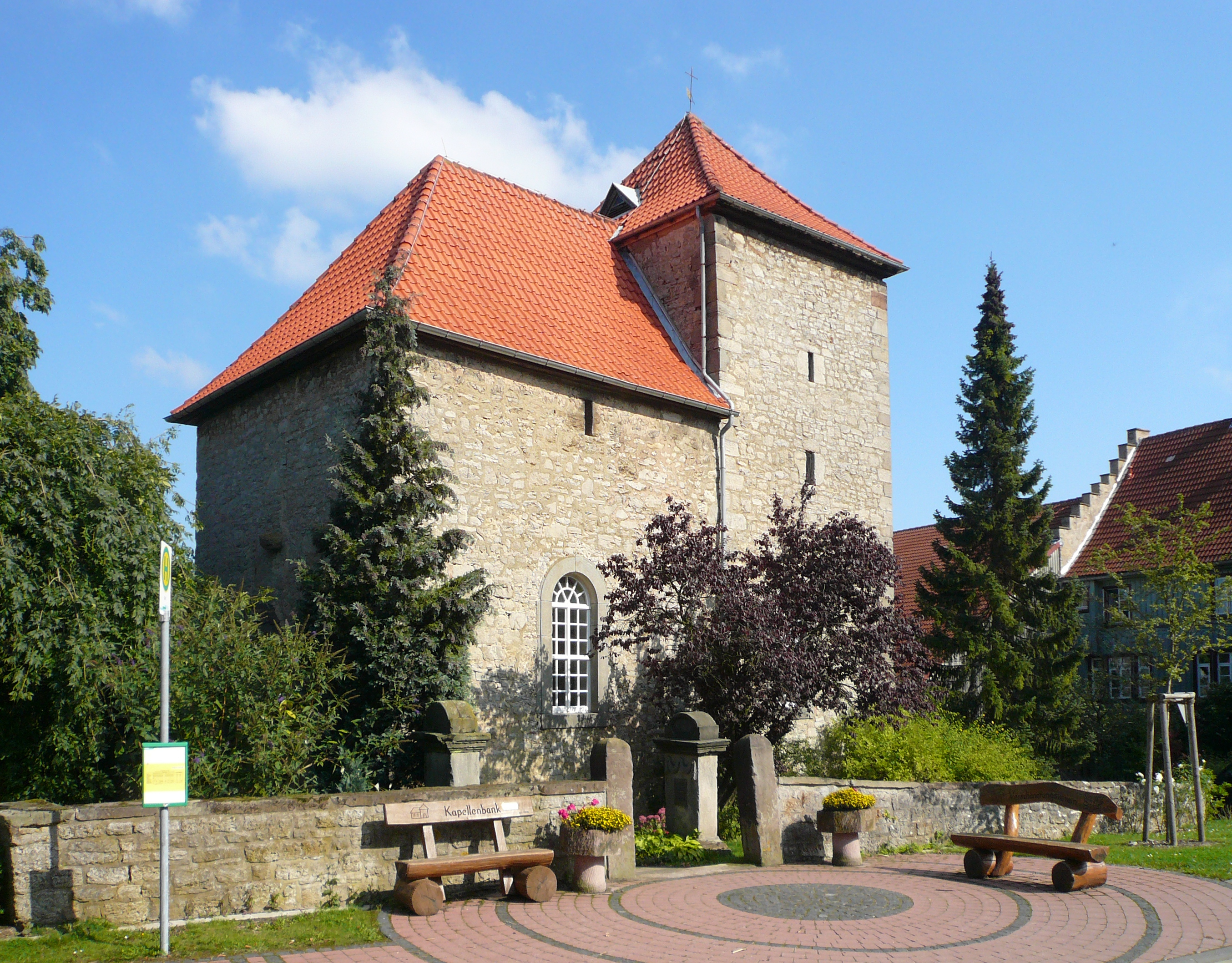 Ev.-luth. Kapelle in Varmissen, Stadt DRansfeld, Niedersachsen. Wehrturm erbaut vermutlich im 14. Jahrhundert, kurz darauf Anbau des Kirchensaals, Fenstereinbau im 18. Jahrhundert